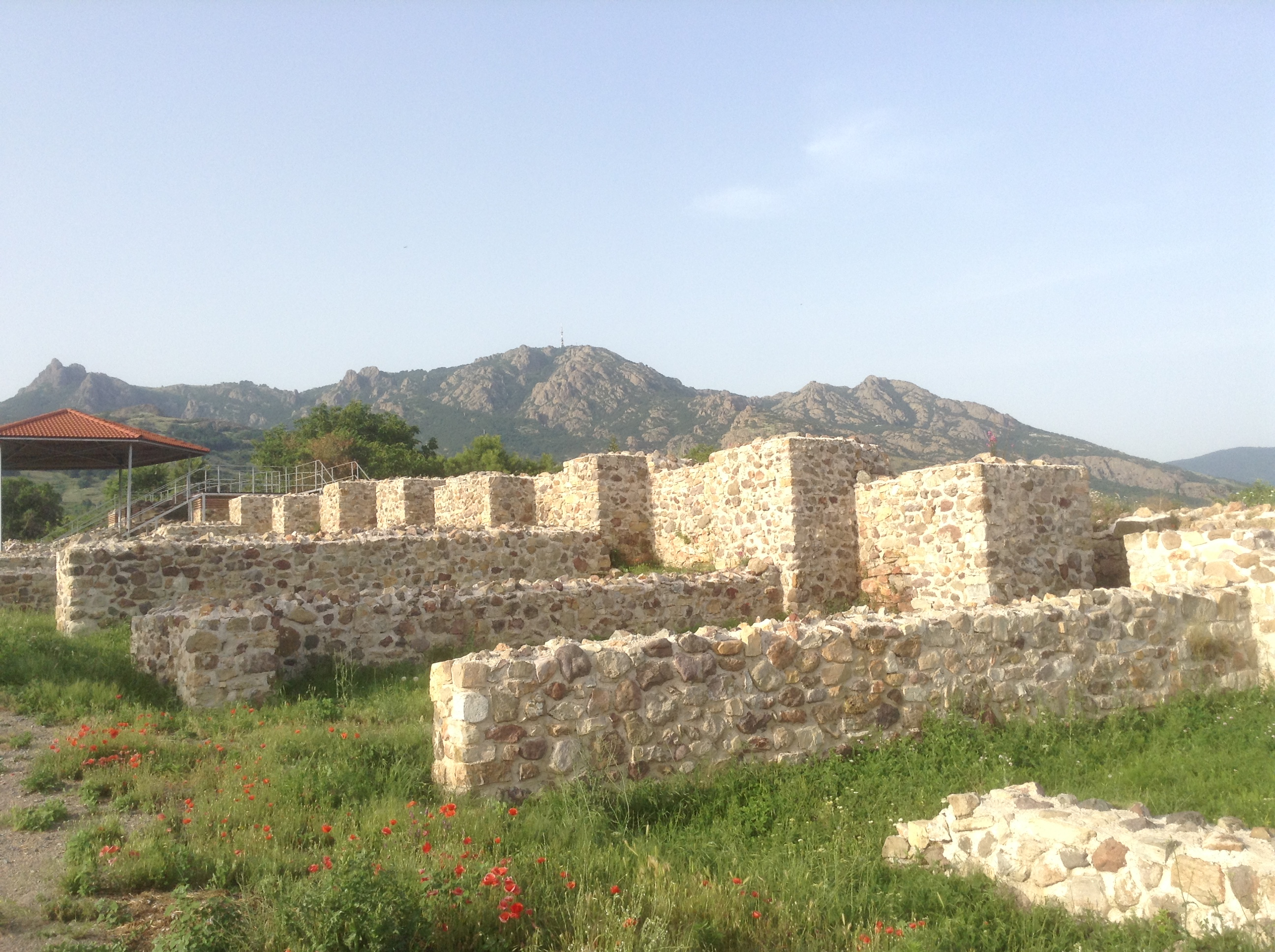 Сините камъни